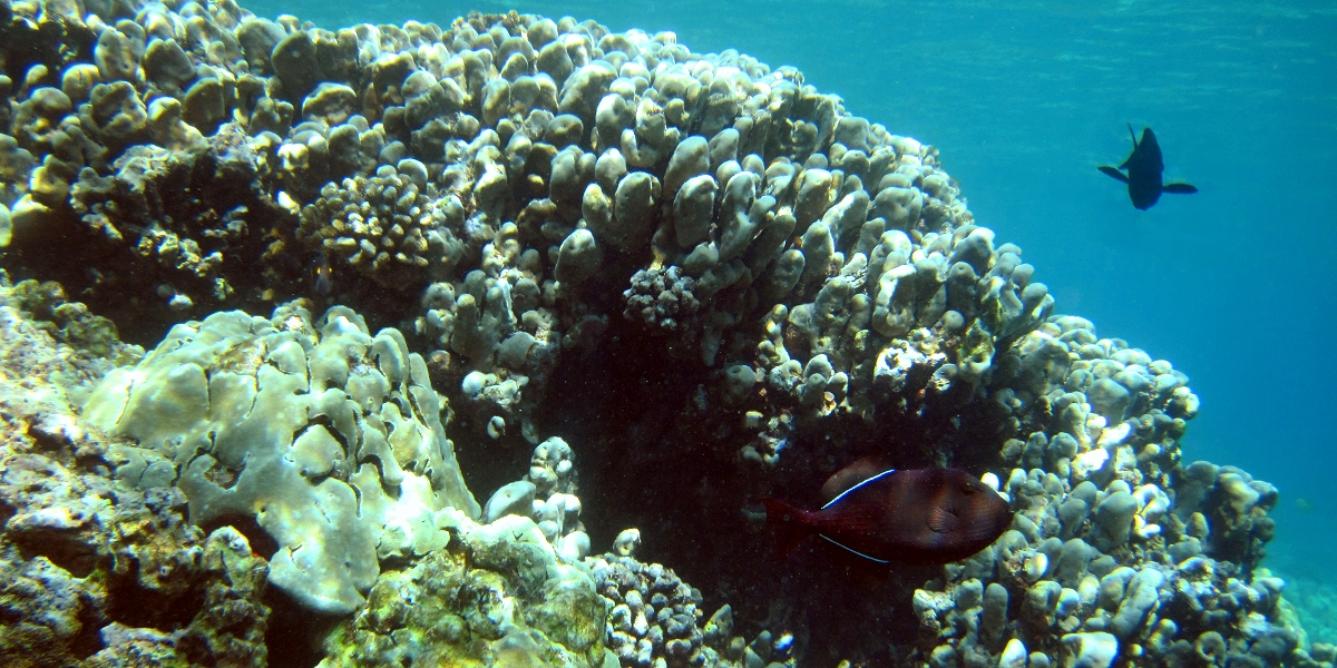 Иллюcтрация для викиучебника Гавайеведение